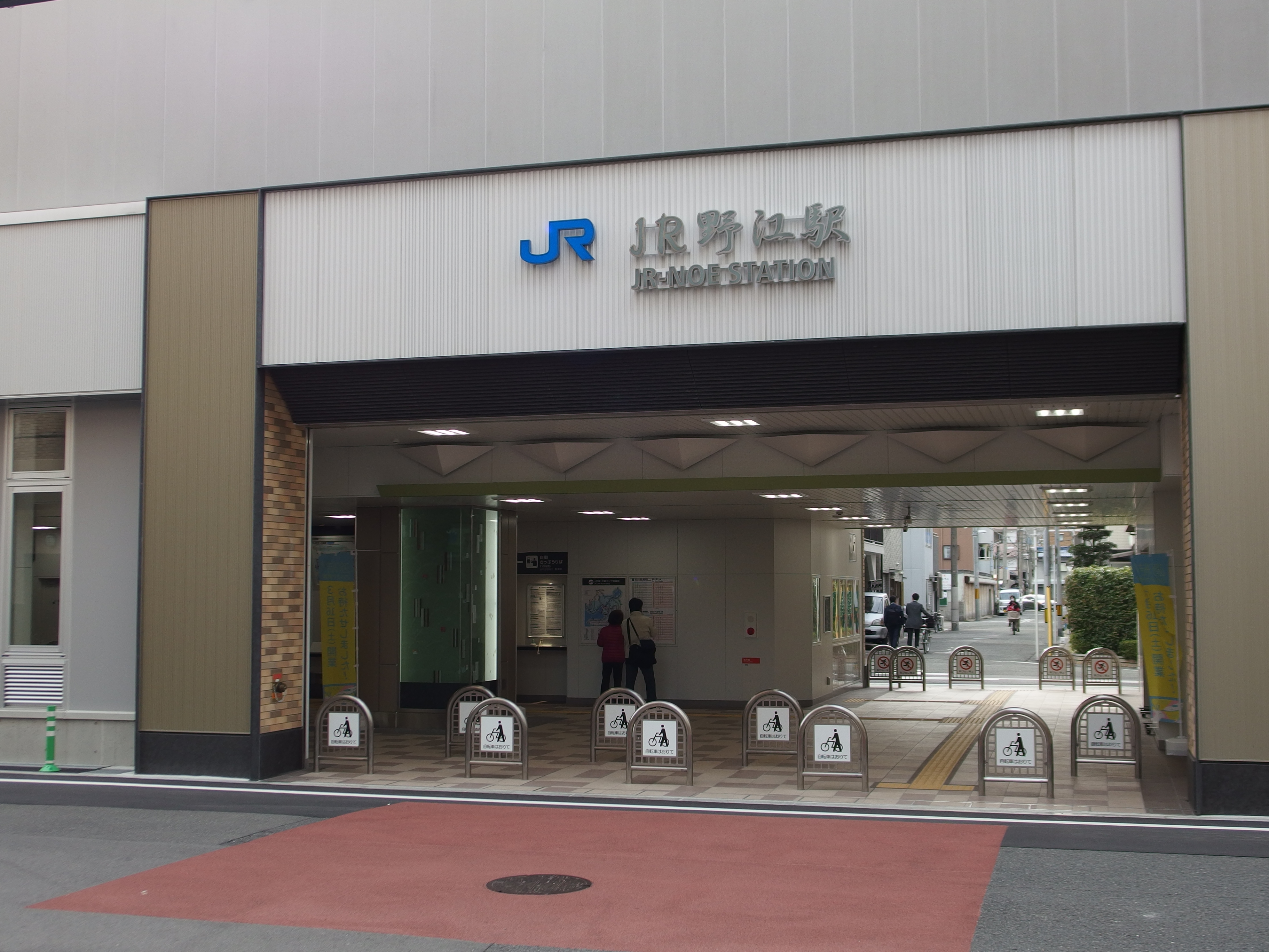 大阪府大阪市にあるJR野江駅の東口。おおさか東線が乗り入れている。